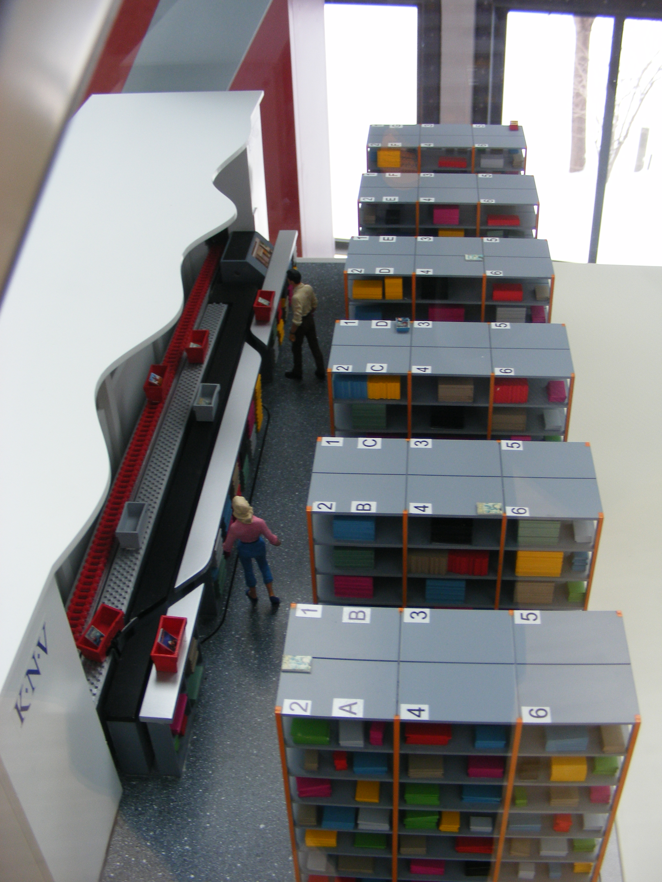 "Internetversand • Modell einer Lagerstation", Maßstab 1:20 — Exponat im Deutschen Museum Verkehrszentrum Munich, Halle II, 1. OG.